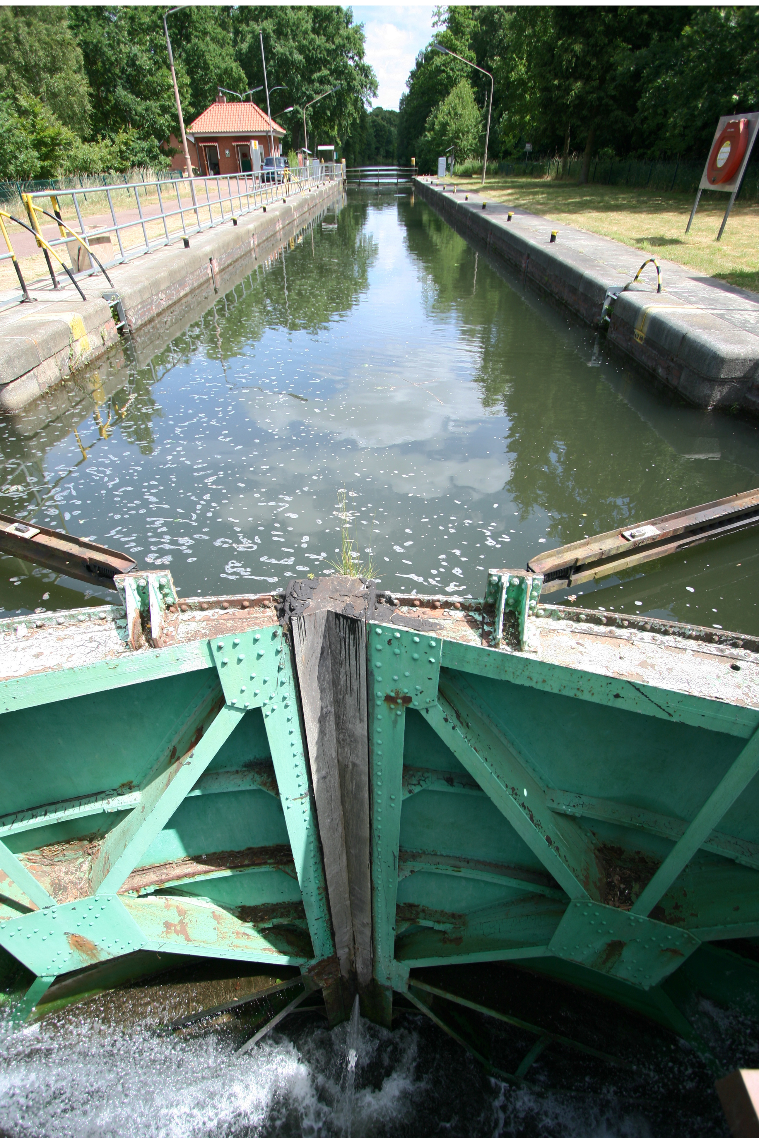 Schleuse an der Müritz-Elde-Wasserstraße bei Bobzin, einem Ortsteil von Lübz, Mecklenburg-Vorpommern